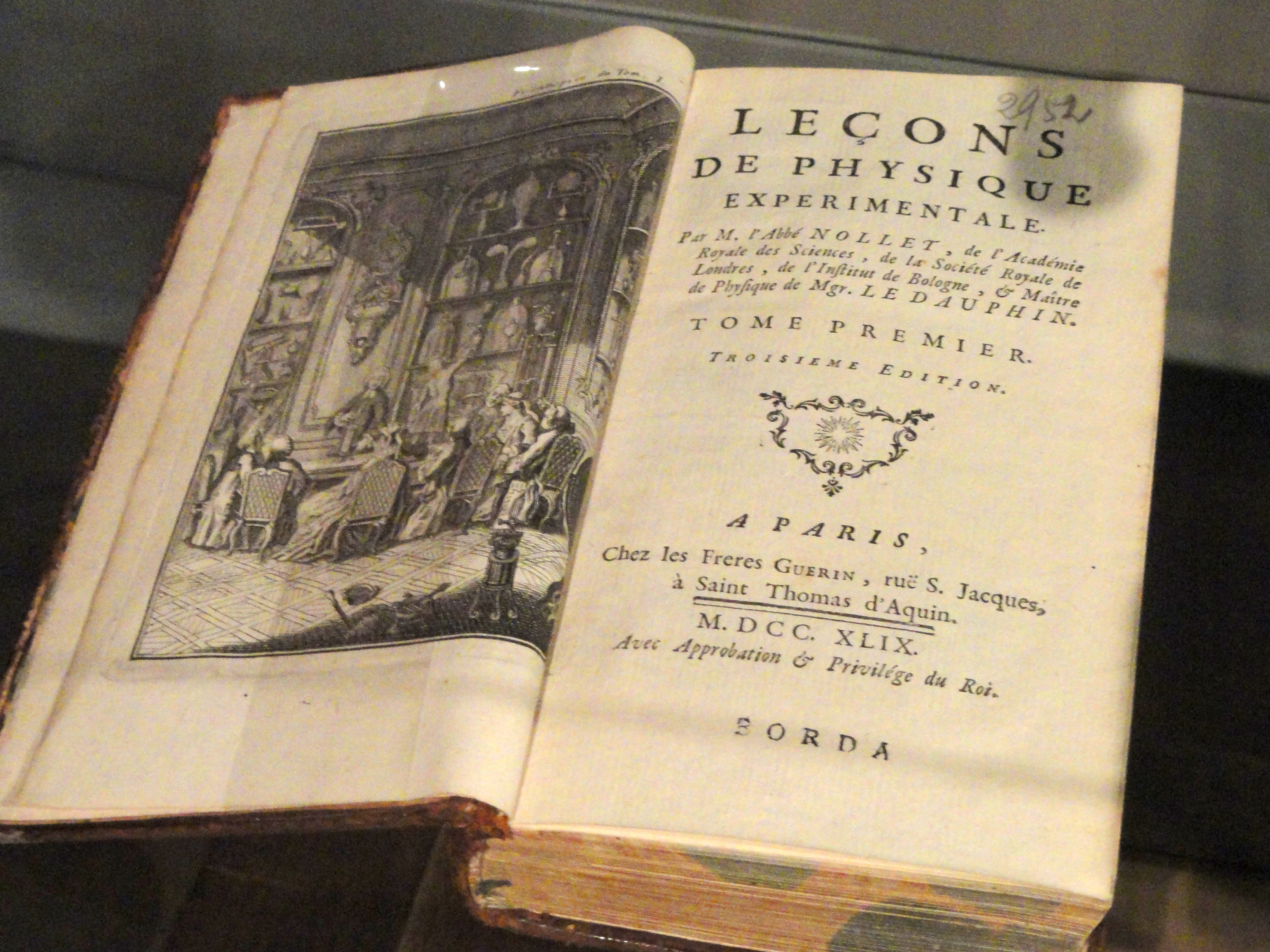 "Leçons de physique expérimentale", 3rd edition, 1749, by Abbé Nollet (Jean-Antoine Nollet). Exhibit in the Musée Nicéphore Niépce, 28 Quai Messageries, Saône-et-Loire, France. There were no restrictions on photography in the museum.